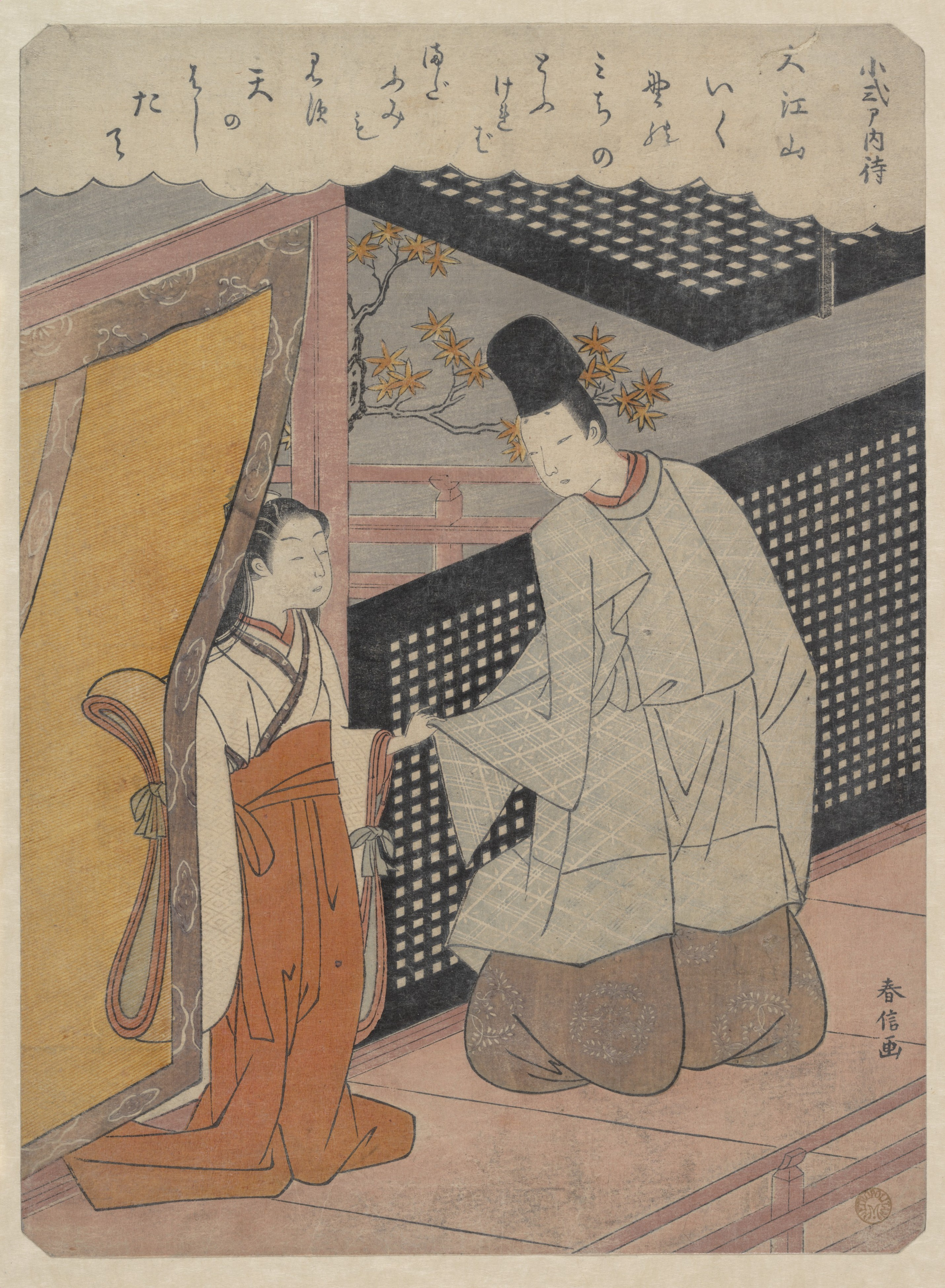 Japan; Print; Prints